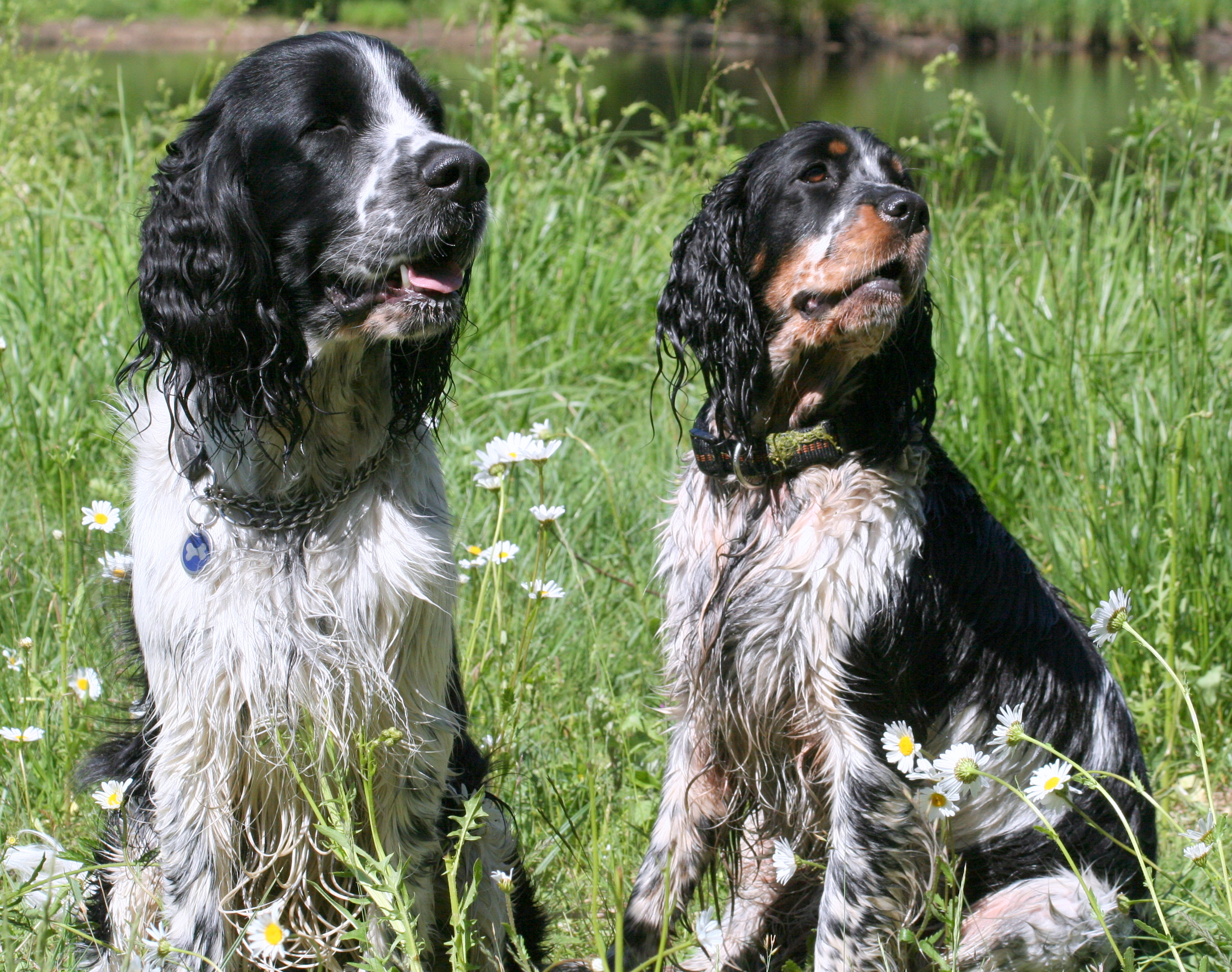 English Springer Spaniel, Rüde schwarz weiß und Hündin schwar weiß mit loh.